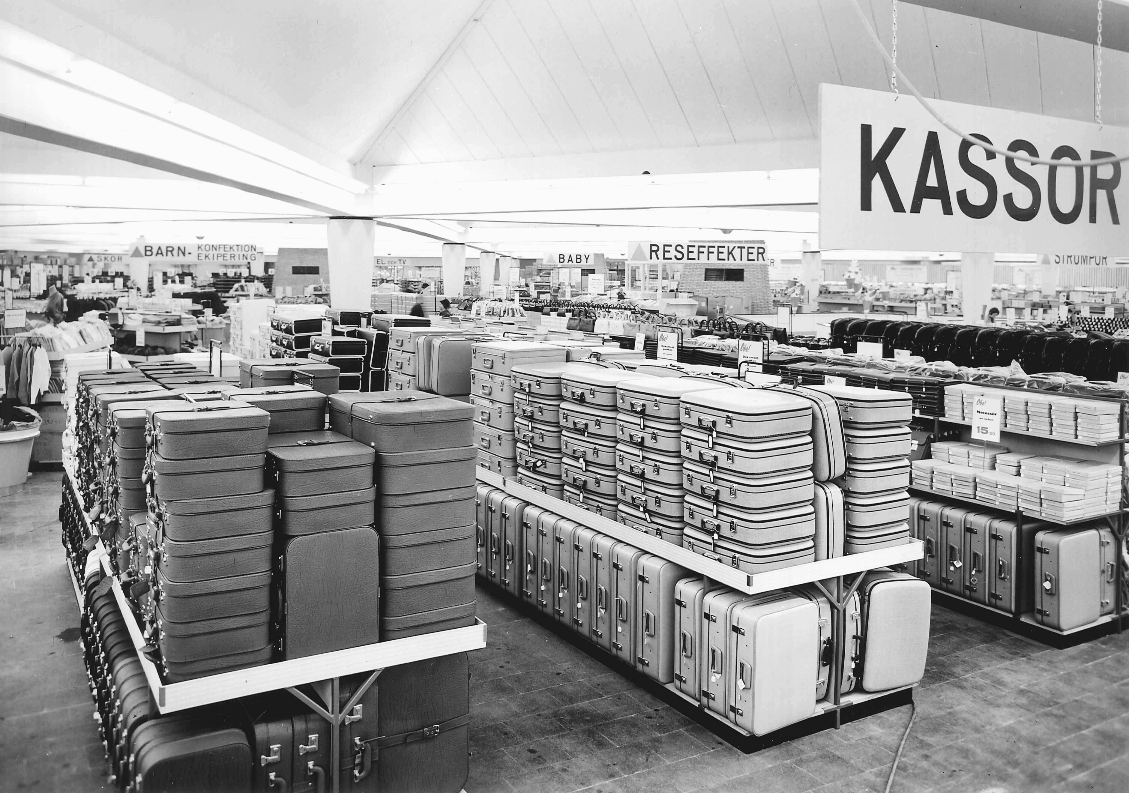 Rabattvaruhuset OBS! i Vårby